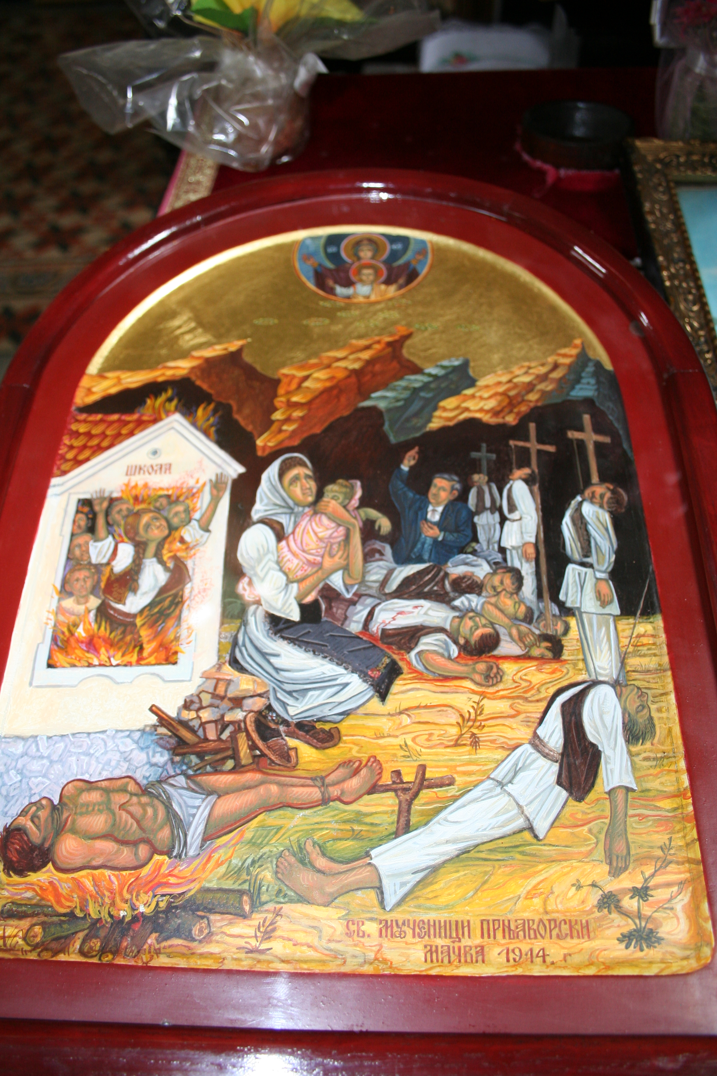 Ikona Svetih velikomučenika prnjavorskih, Crkva Sv. Ilije, Prnjavor